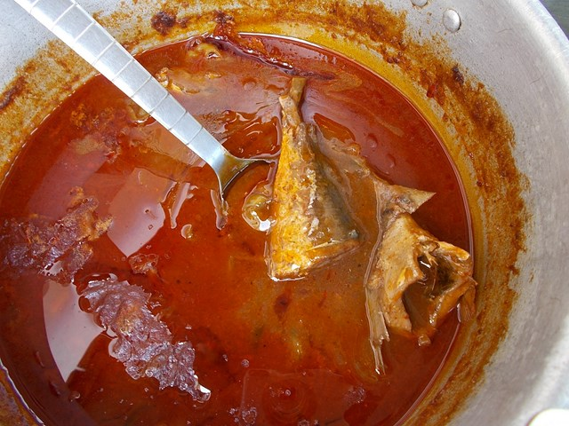 sauce tomate au poisson This is an image of food from Togo